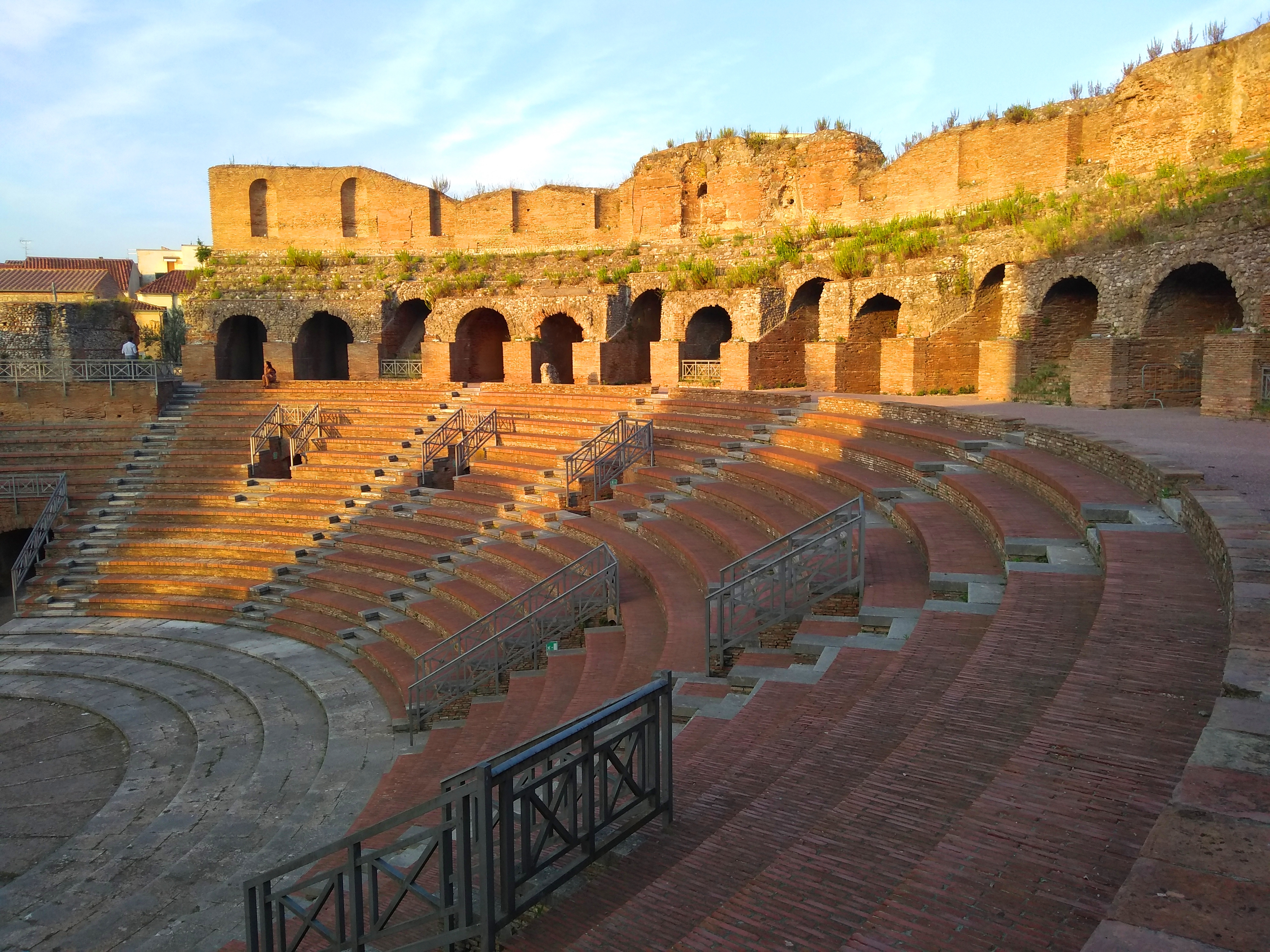 Teatro romano di Benevento : l'altro lato della zona del pubblico. This is a photo of a monument which is part of cultural heritage of Italy.